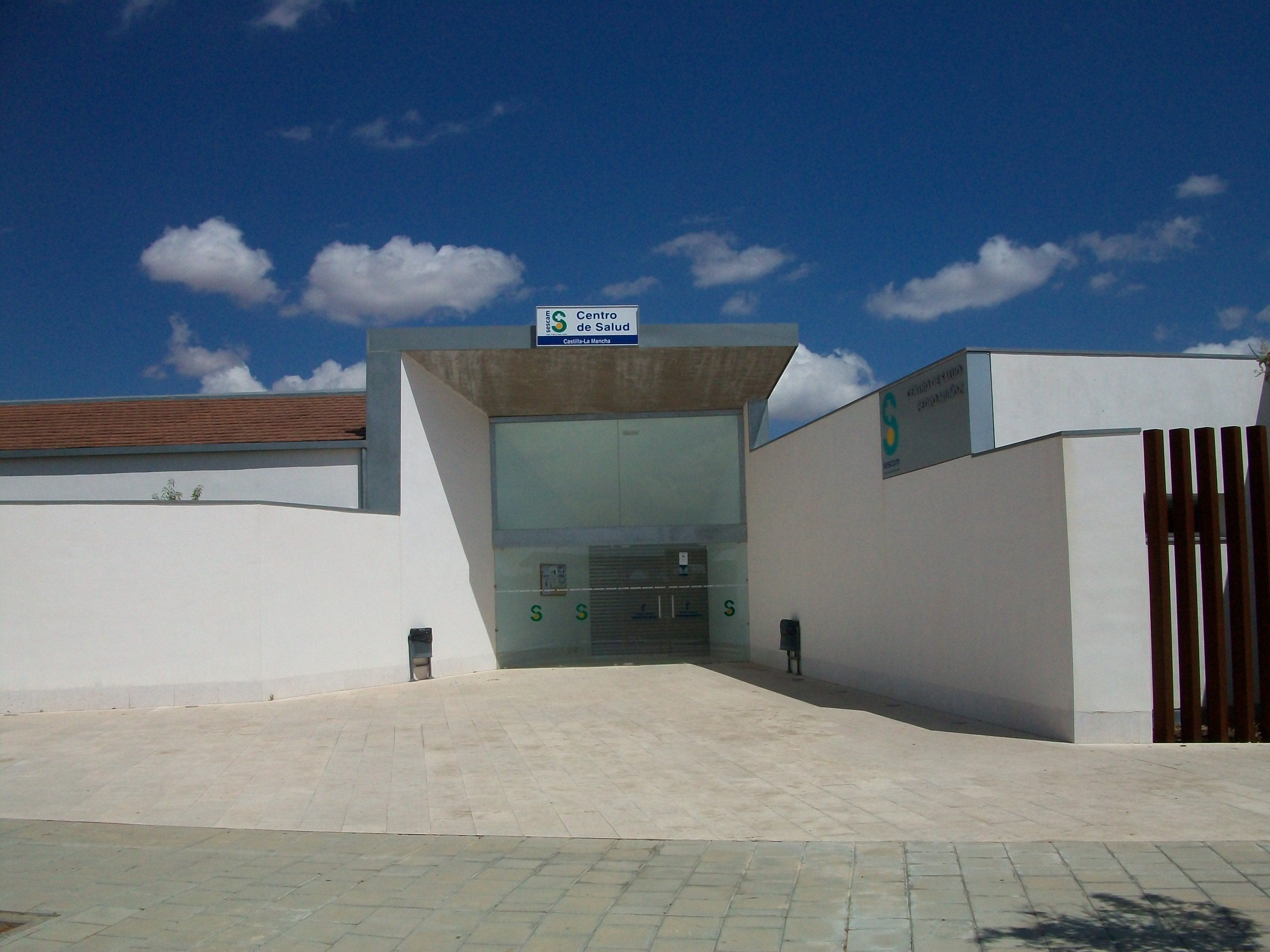 Centro de atención primaria (centro de salud) en Pedro Muñoz.